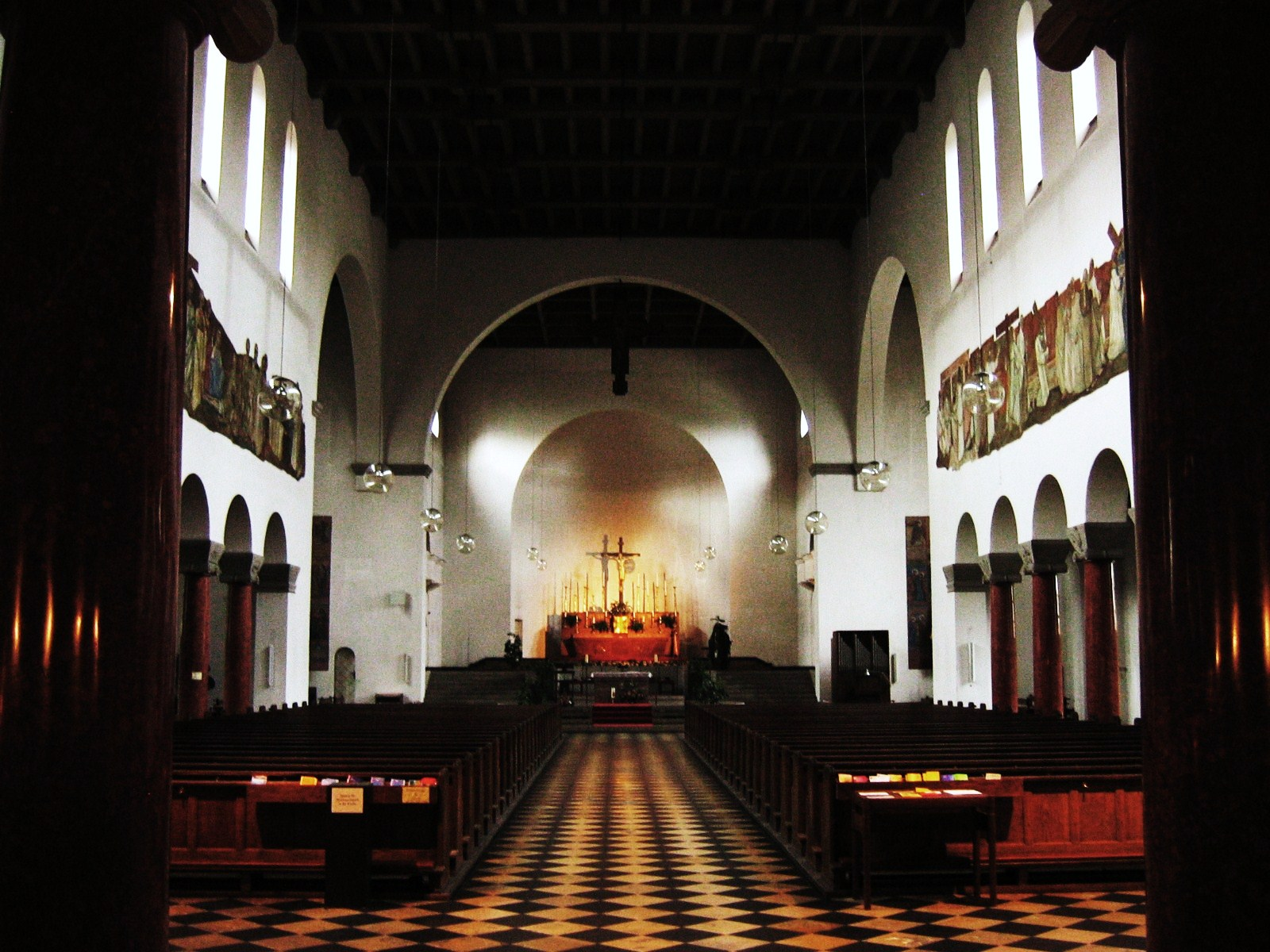 Inneres von St. Gabriel in München-Haidhausen